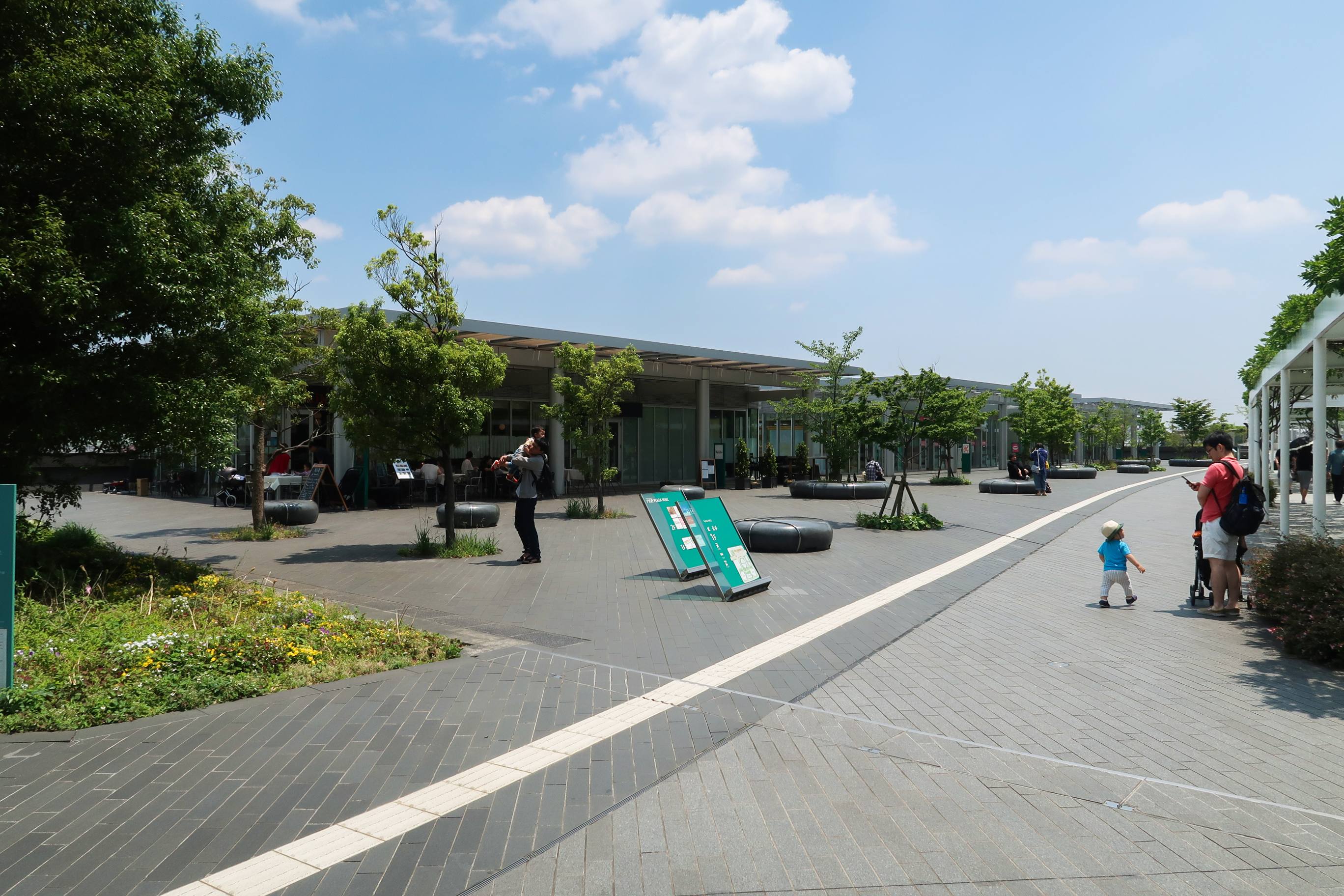 Futako Tamagawa Rise Plaza Mall